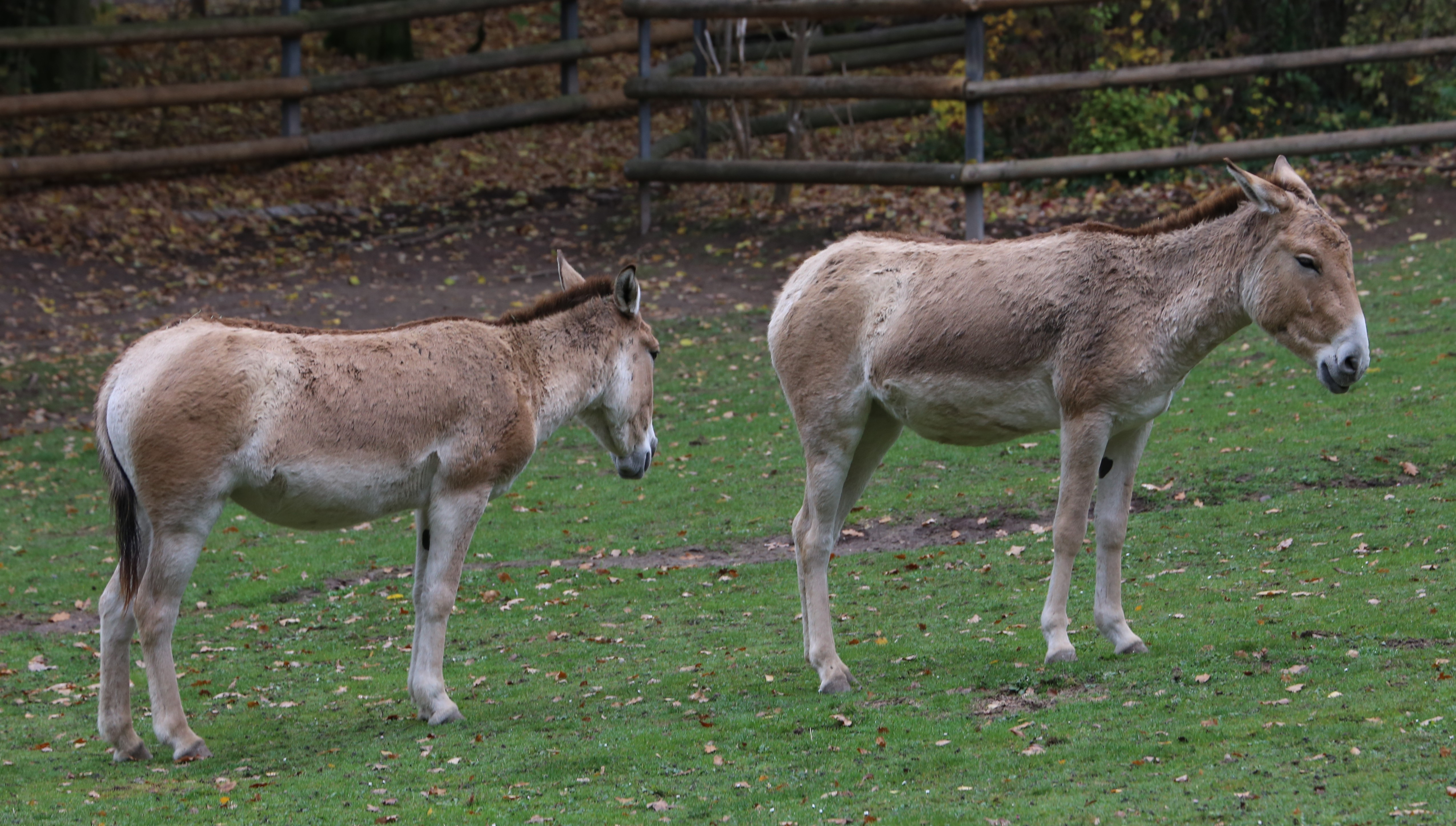 Kulan (Equus hemionus kulan), Tiergarten Nürnberg